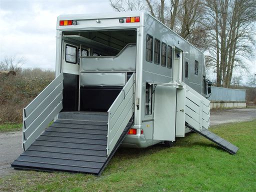 Die geöffneten Laderaumklappen verdeutlichen die Verstaumöglichkeiten dieses Pferdetransporters.